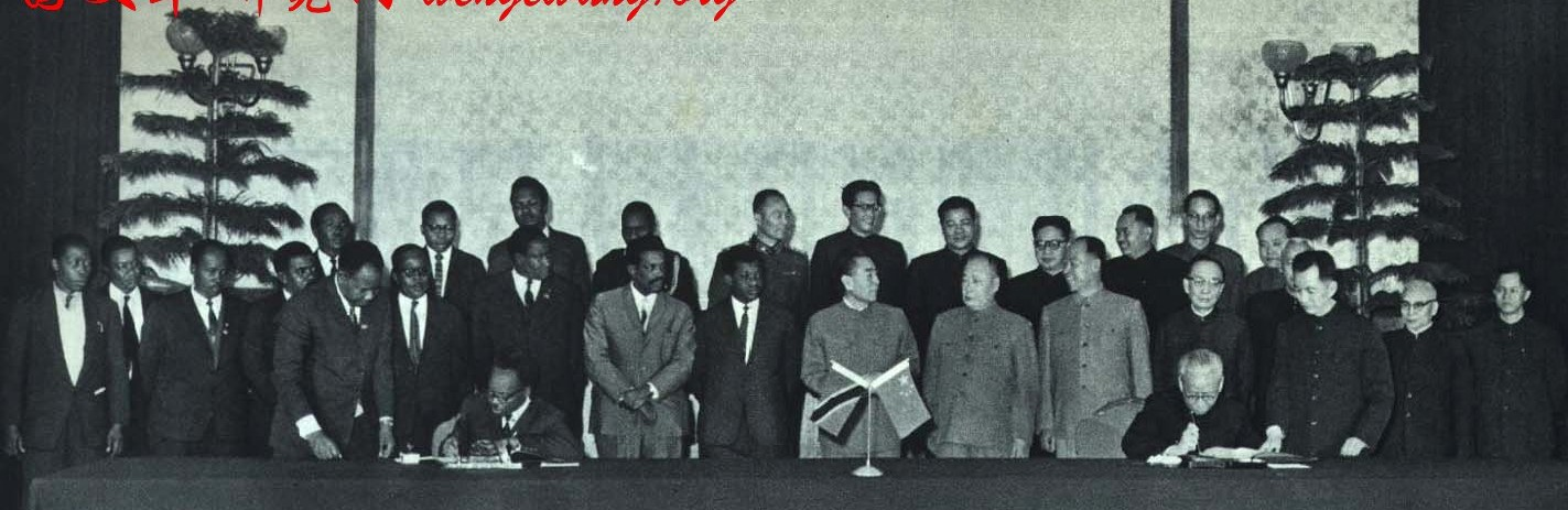 1965-4 1965年2月刘少奇与尼雷尔签署协议